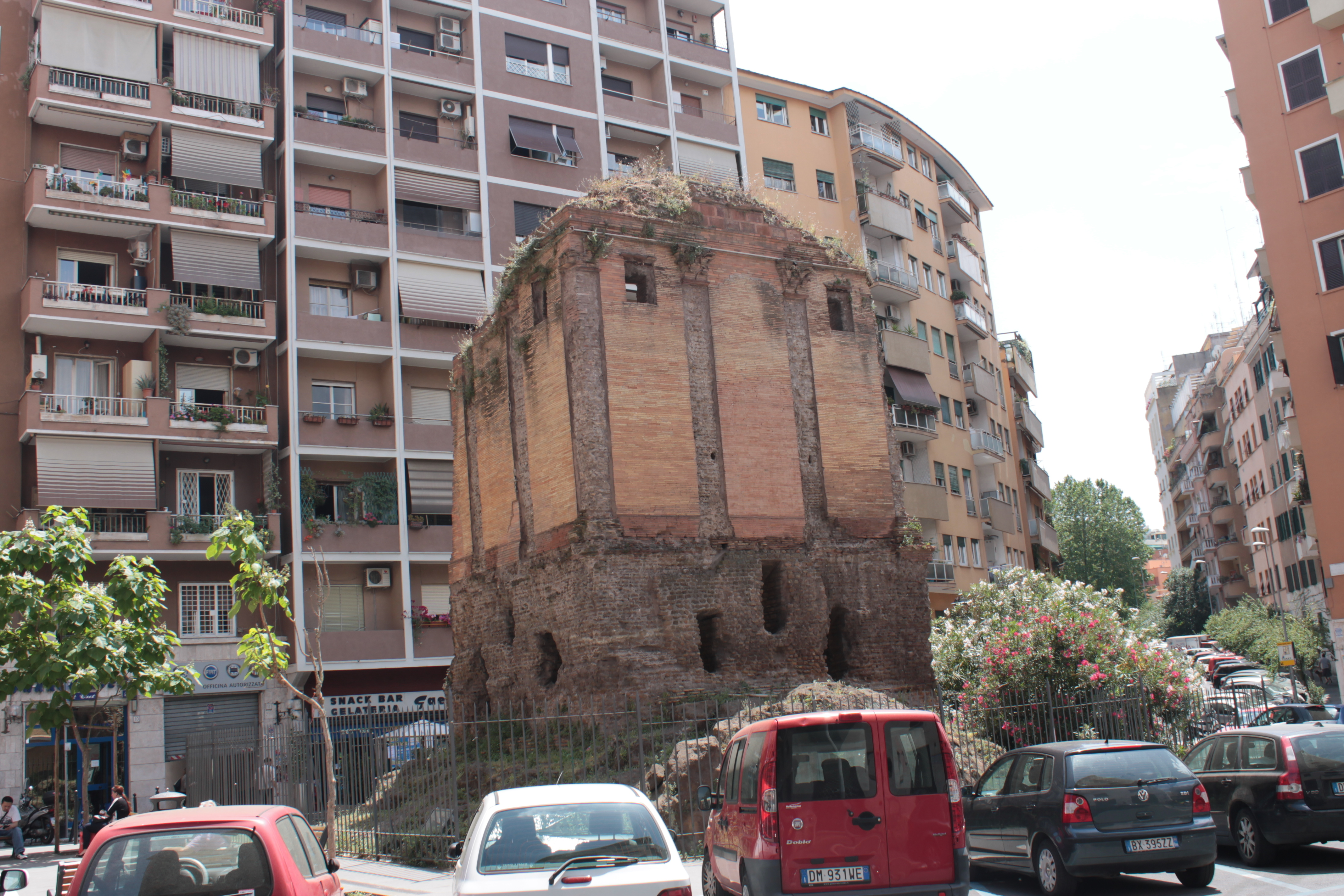 Sedia del Diavolo, veduta posteriore This is a photo of a monument which is part of cultural heritage of Italy.